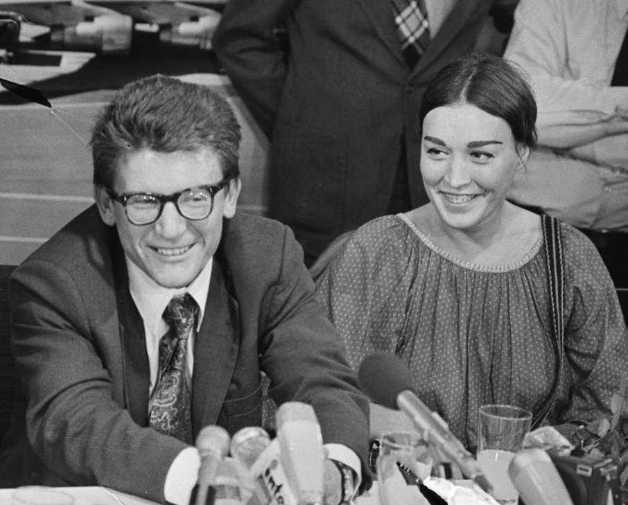 Russische dissident Amalrik en echtgenoot op Schiphol, Andrej en Gjoezel, Amalrik tijdens persconferentie